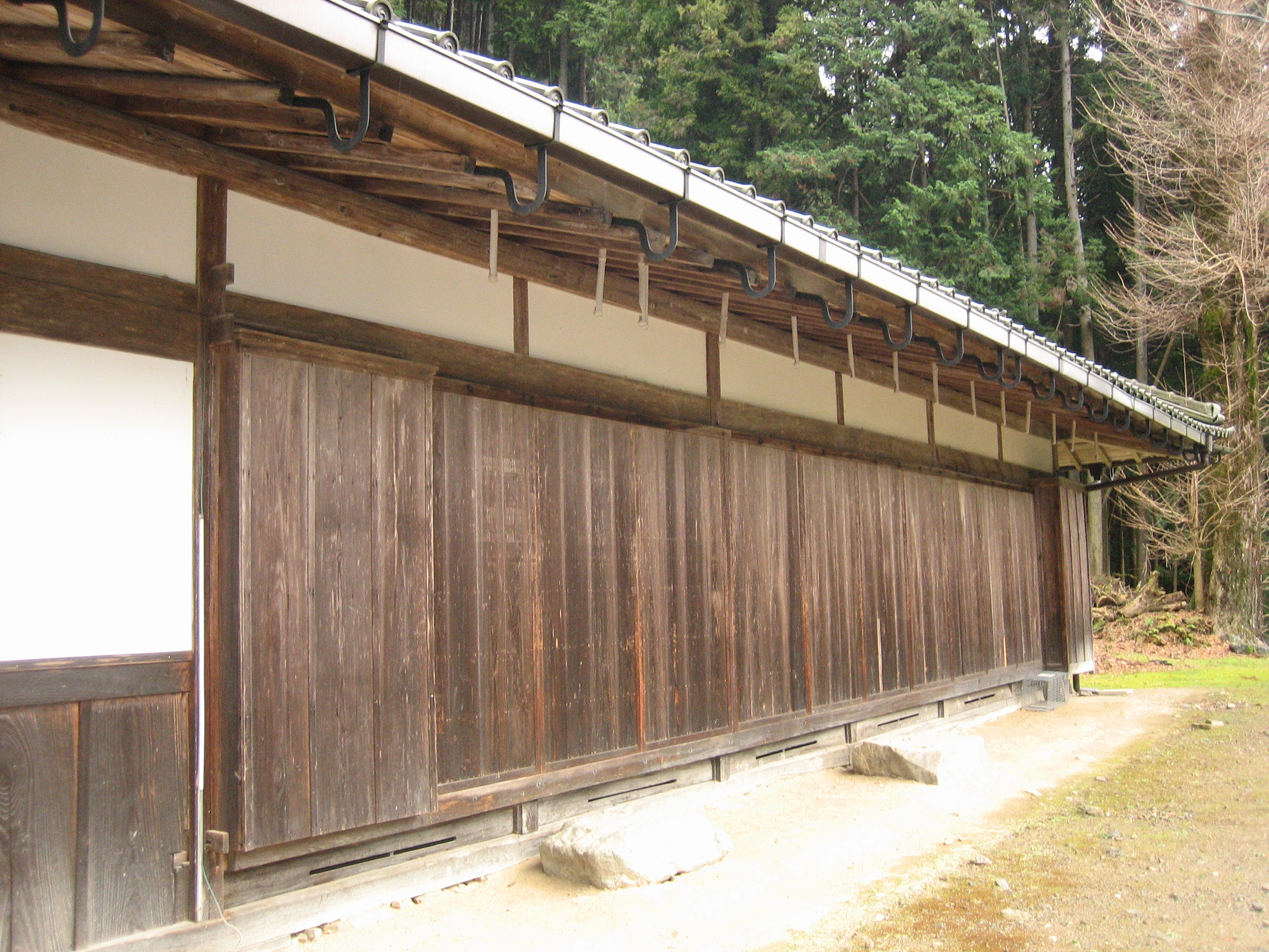 高雲寺本堂を撮影